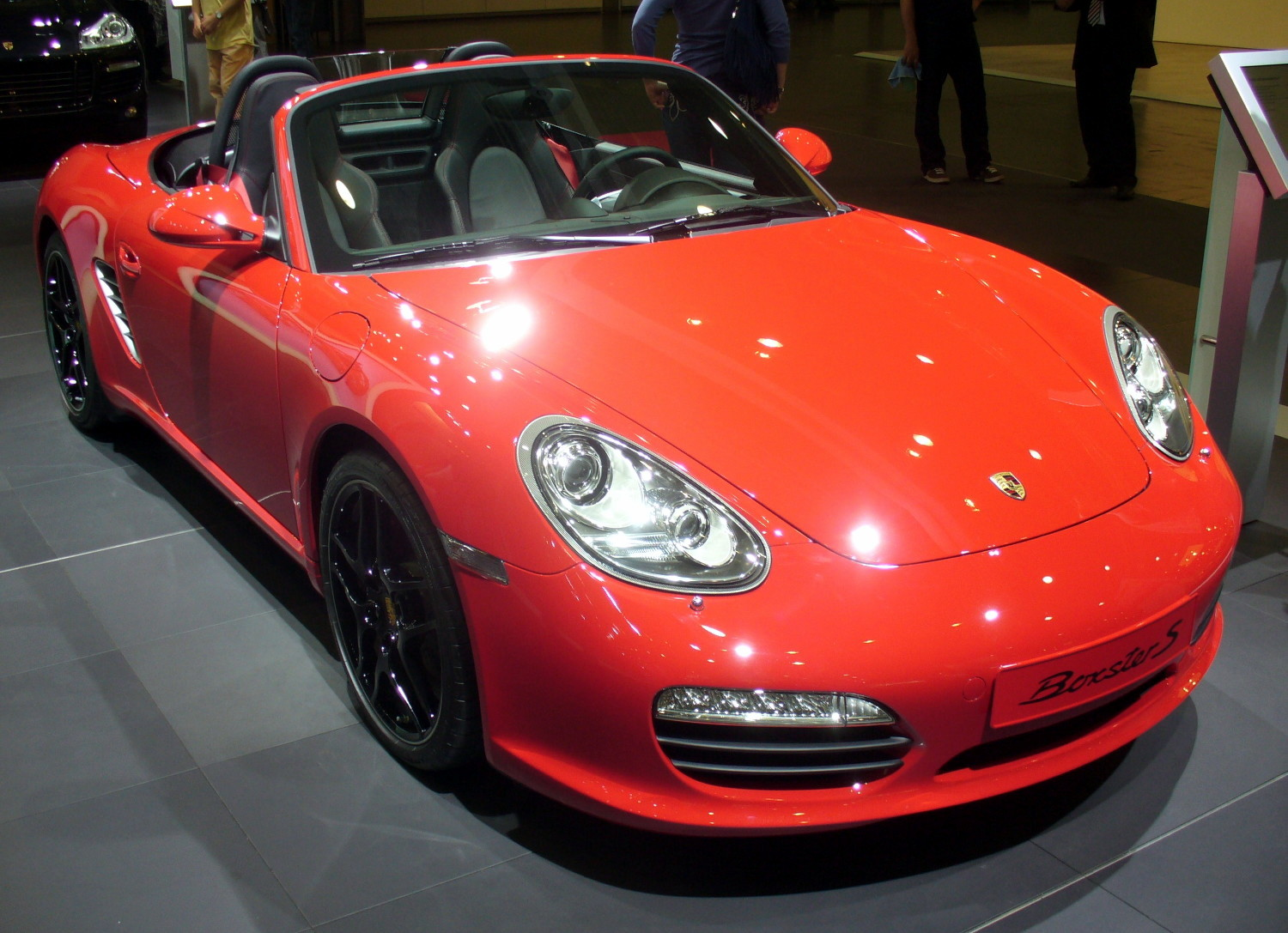 Porsche 987 Facelift